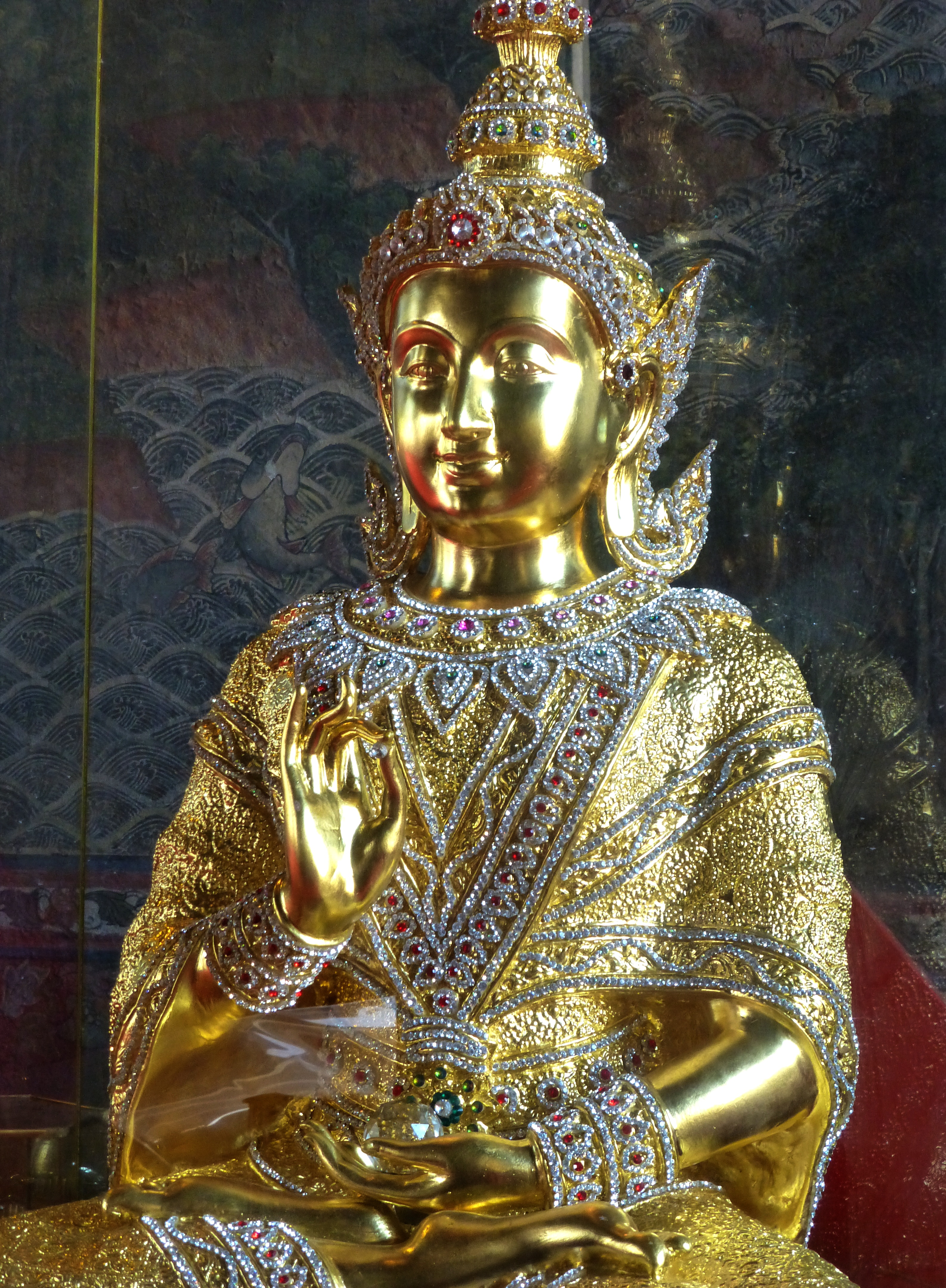 Wat Suthat, Bangkok